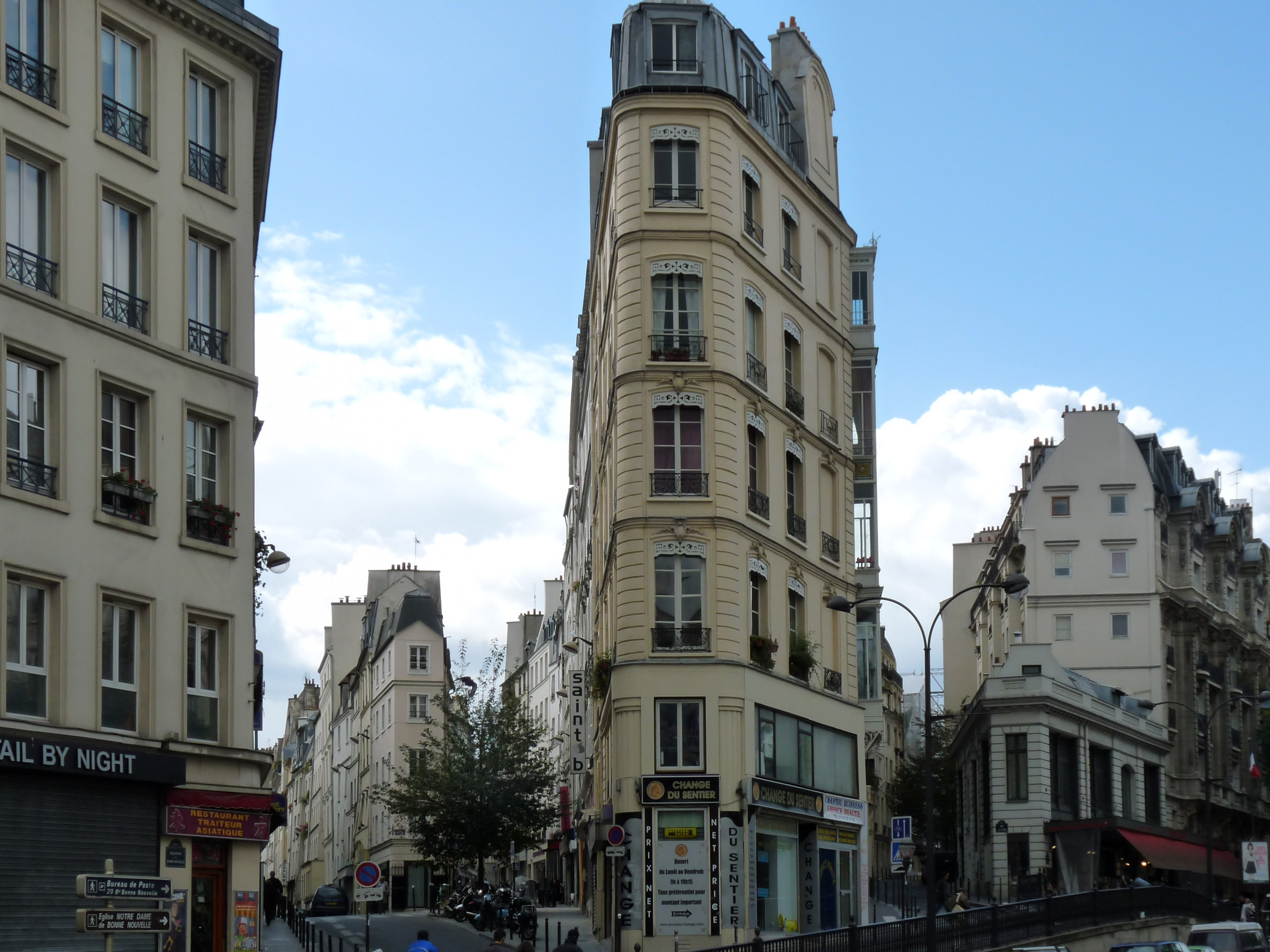 La butte Bonne Nouvelle à Paris, vue de la Porte Saint-Denis.